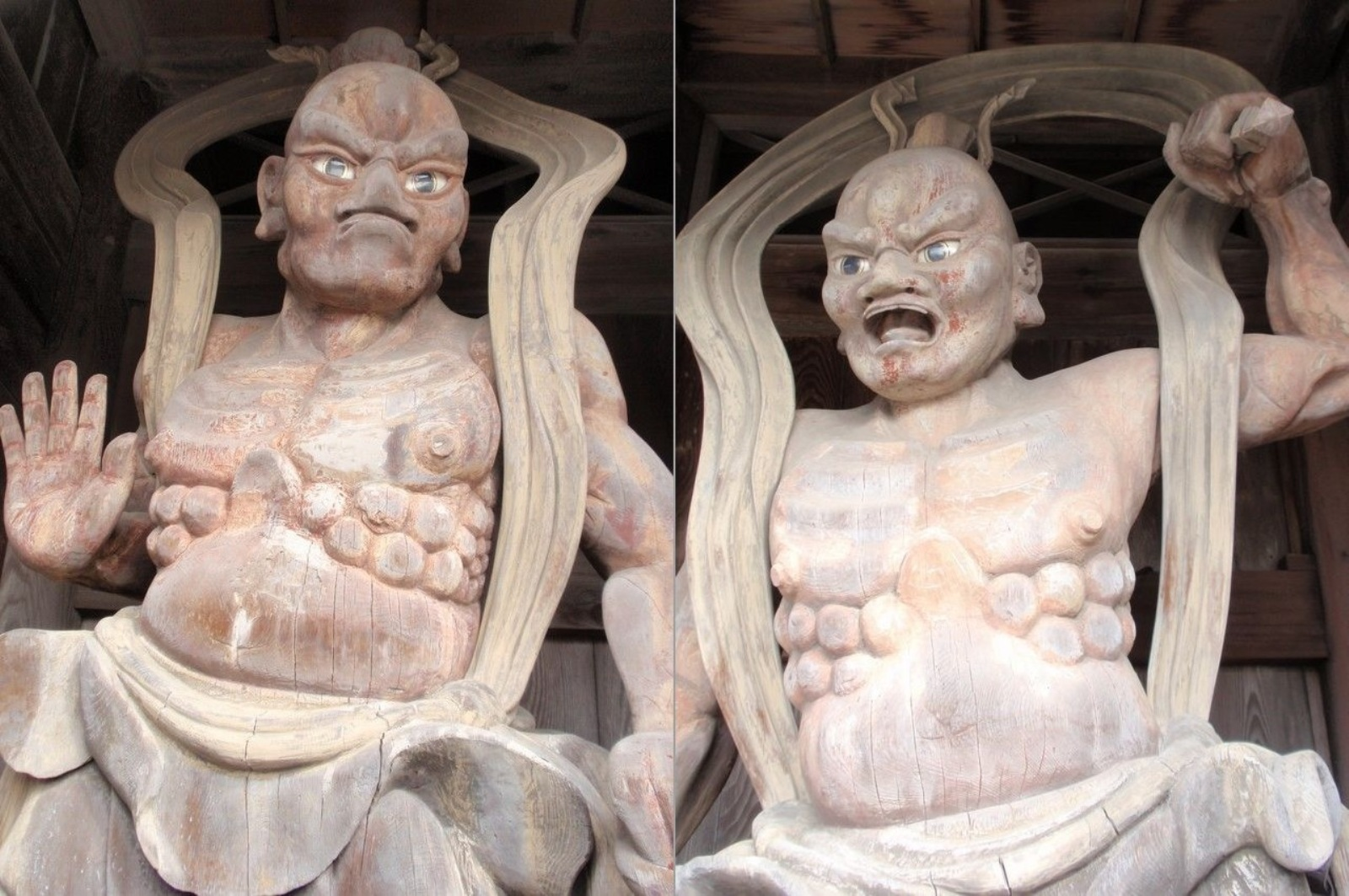 土佐国分寺 仁王像